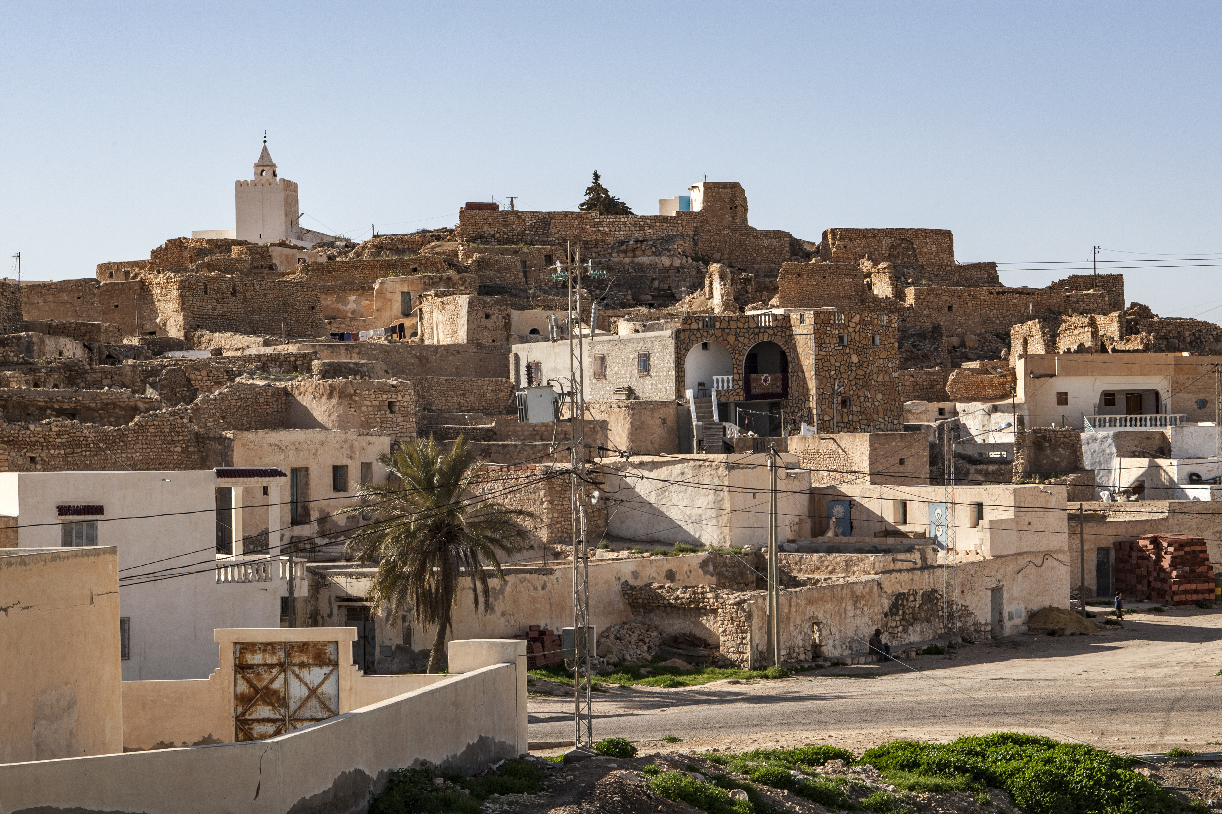 Tamezret - stara wieś berberyjska